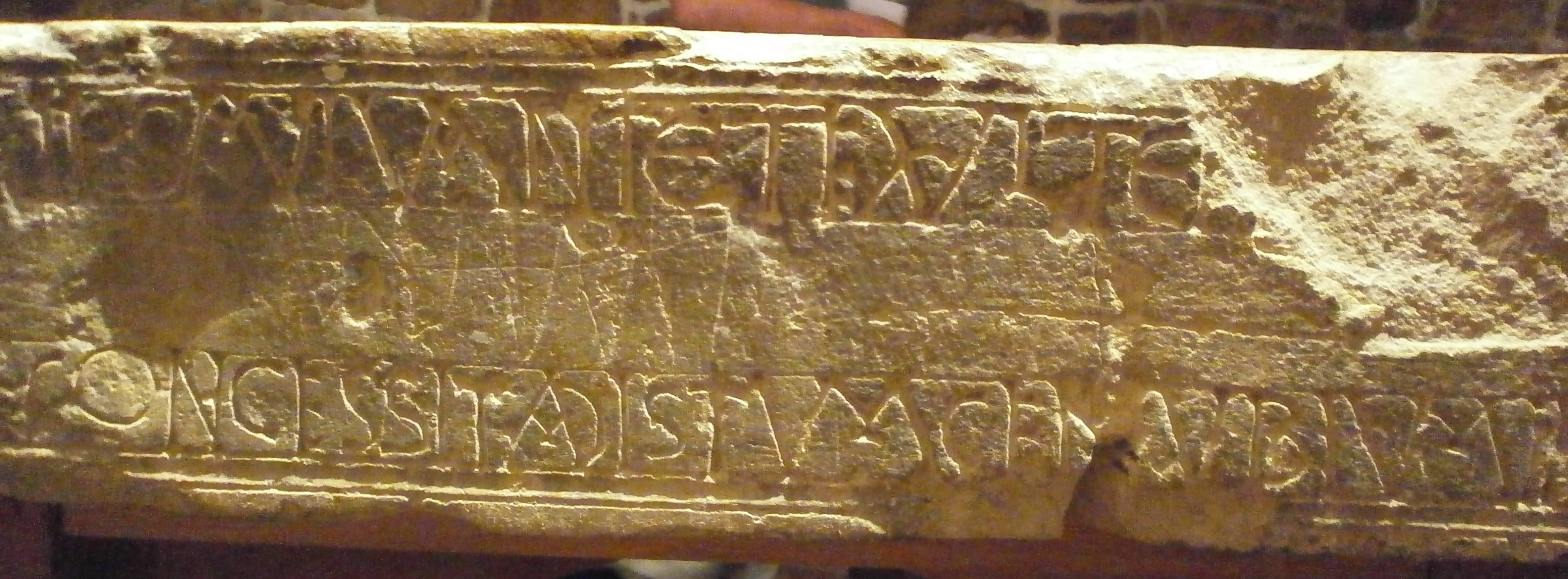 Autel de l'ancien couvent du Ham, bibliothèque municipale de Valognes